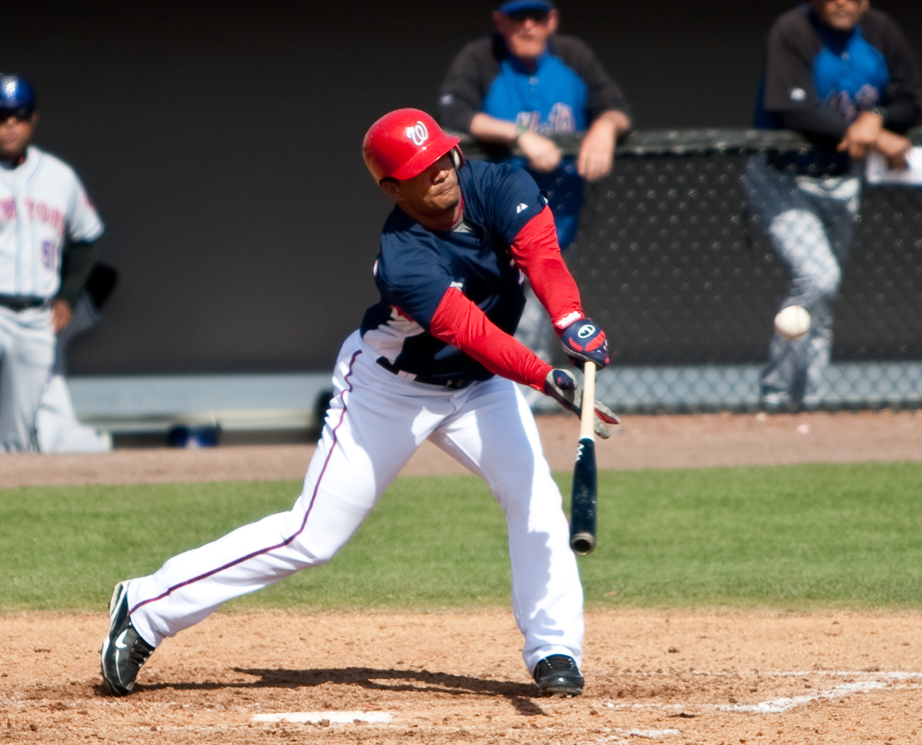 Alberto González